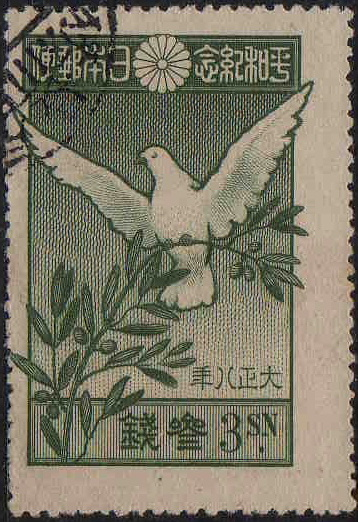 日本がヴェルサイユ条約締結を記念して発行した3銭切手